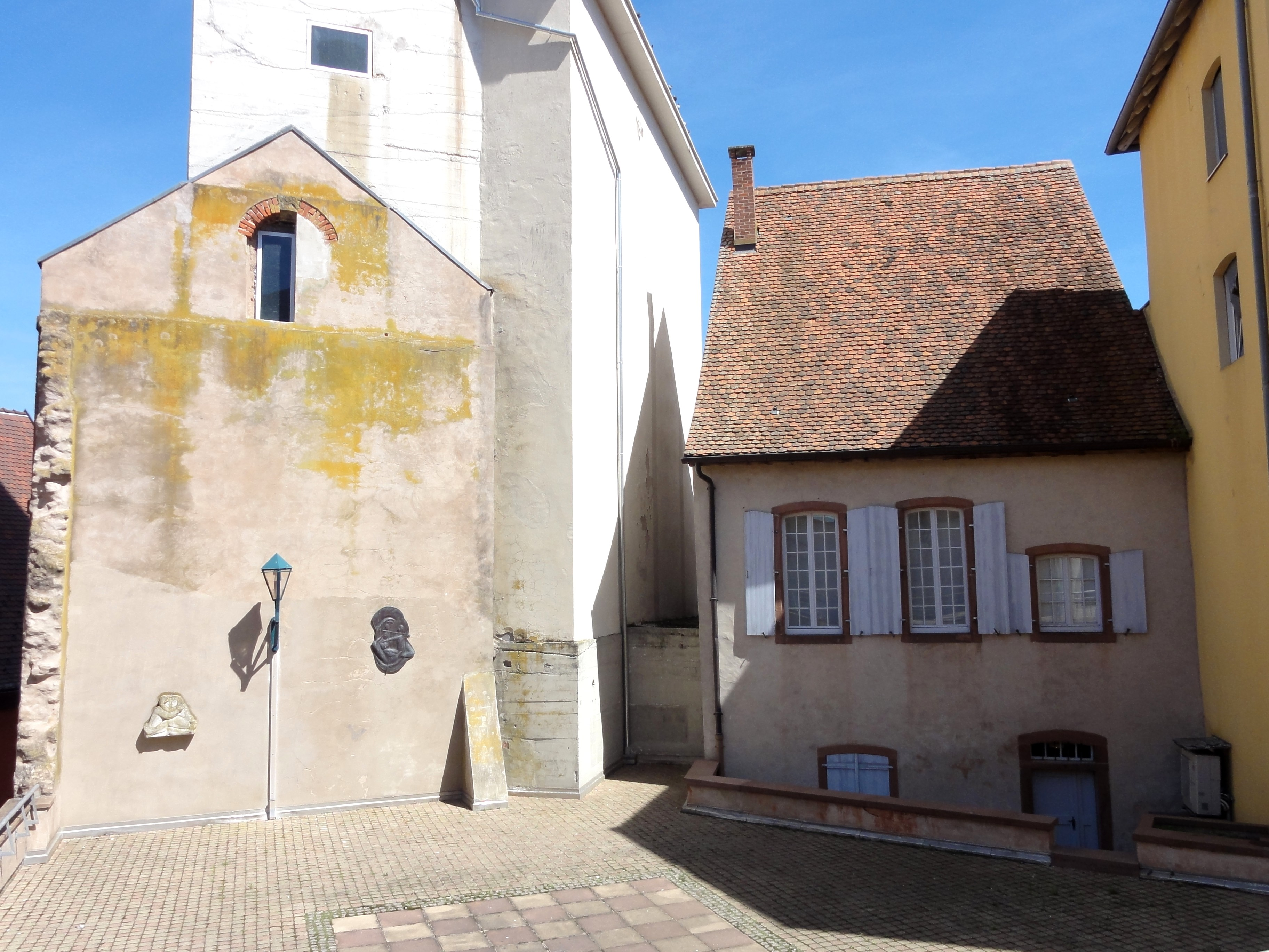 Alsace, Bas-Rhin, Pfaffenhoffen, Synagogue (1791): (PA00084894, IA67010135).